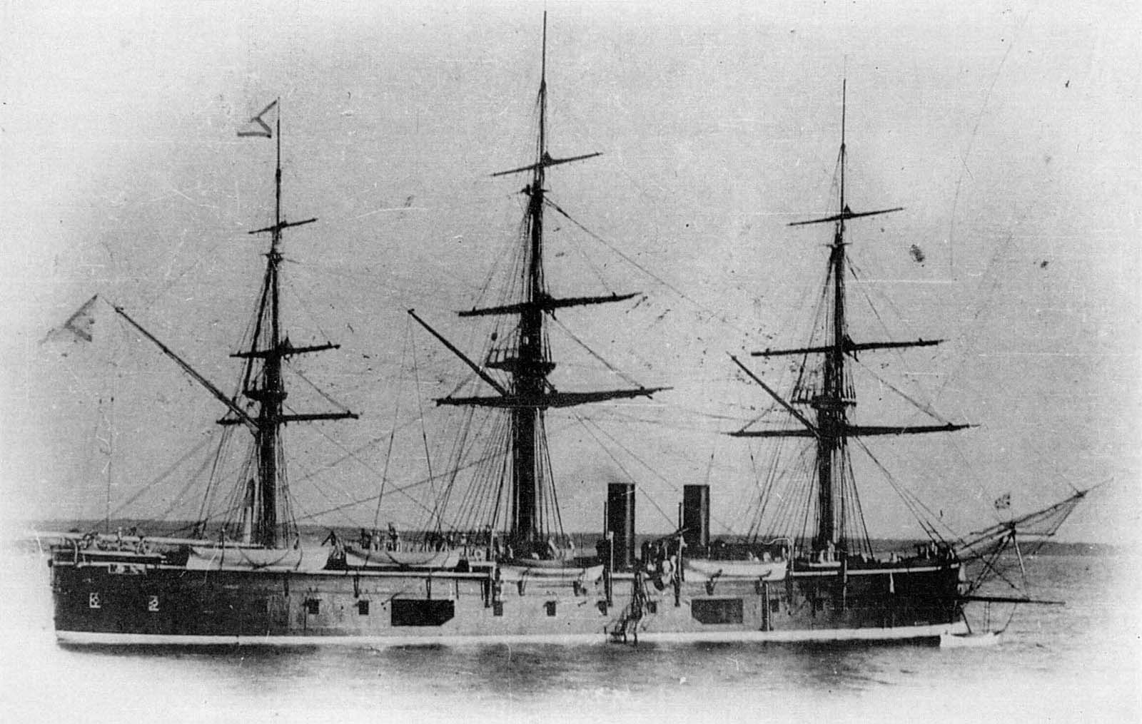 Броненосный фрегат «Князь Пожарский».